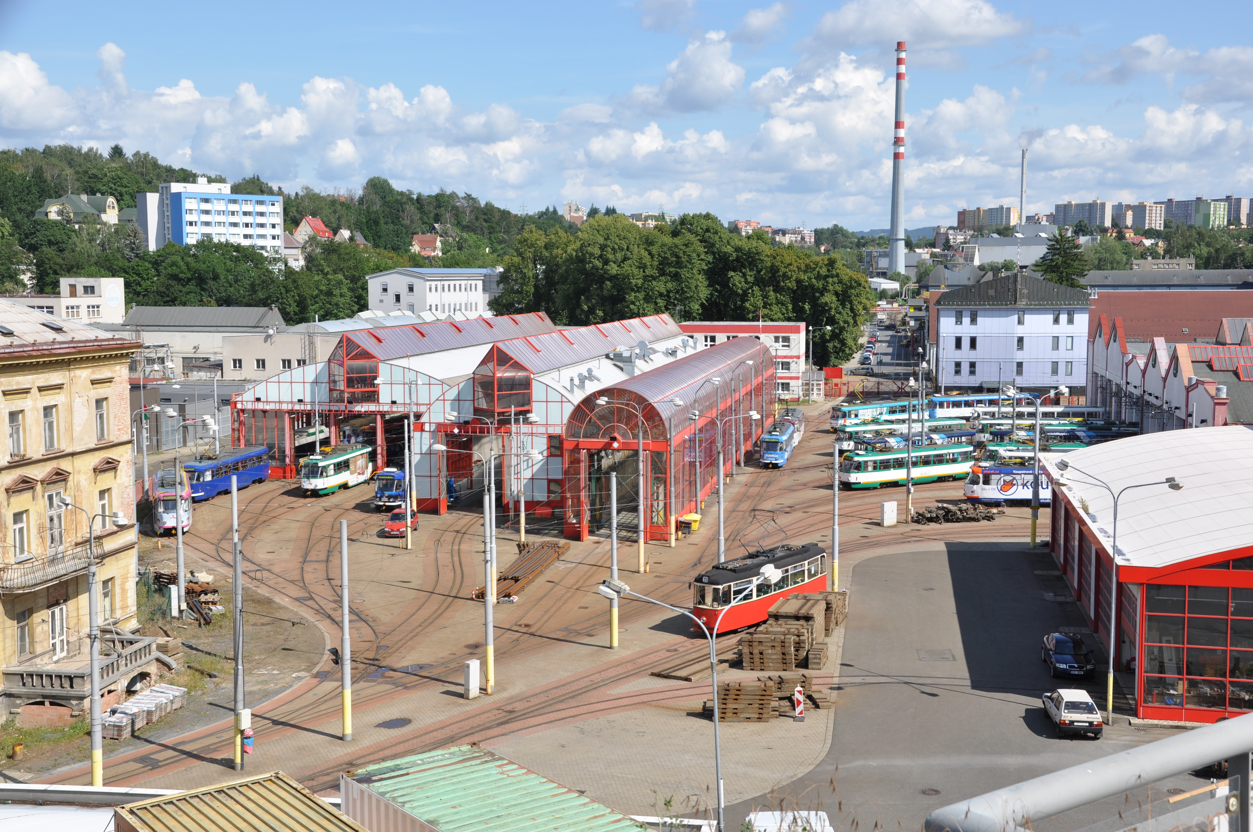 Depot Mrštíkova der Straßenbahn Liberec. Wegen Bauarbeiten am Tuchplatz sind die nicht benötigten Wagen im Depot abgestellt. Im Vordergrund steht der museale Gothawagen Typ T2-62 Nr. 145 des Boveraclubs, der 2016 von der Straßenbahn Jena übernommen werden konnte.